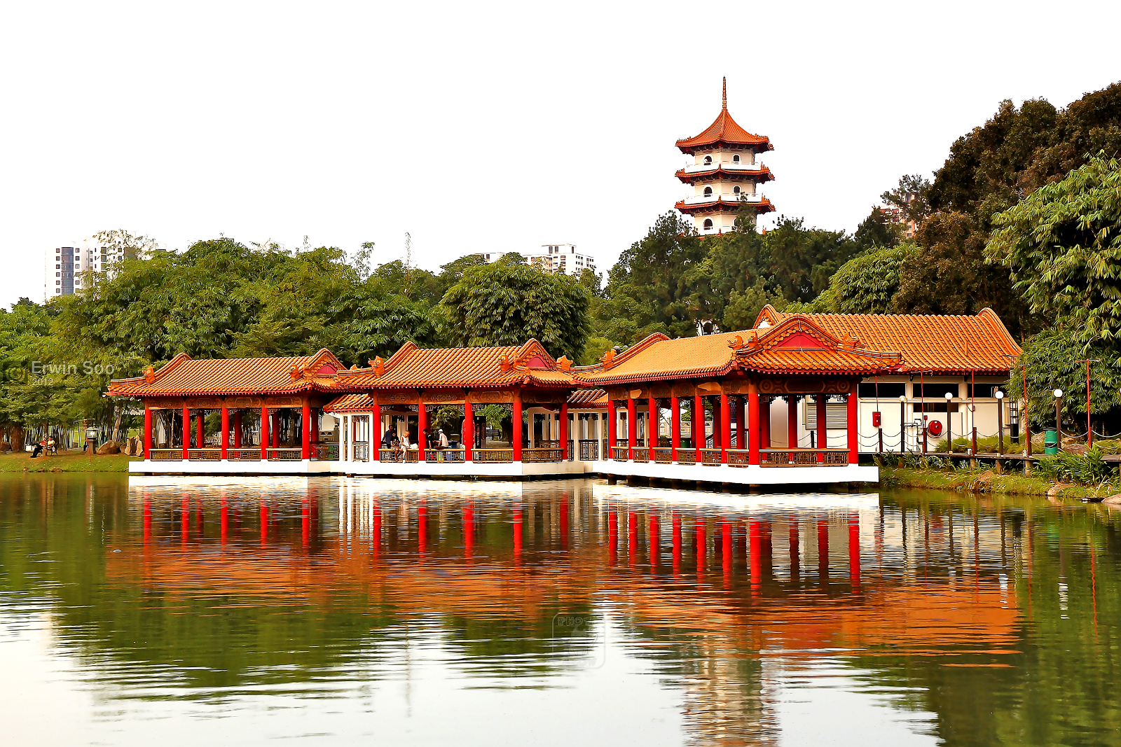 Chinese Gardens